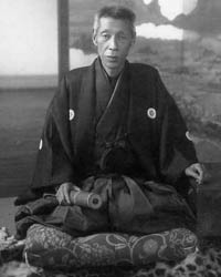 竹添進一郎、天保12年（1841年）～大正6年（1917年）、外交官（甲申政変時の朝鮮駐在弁理公使）で漢学者、加納治五郎の妻の父